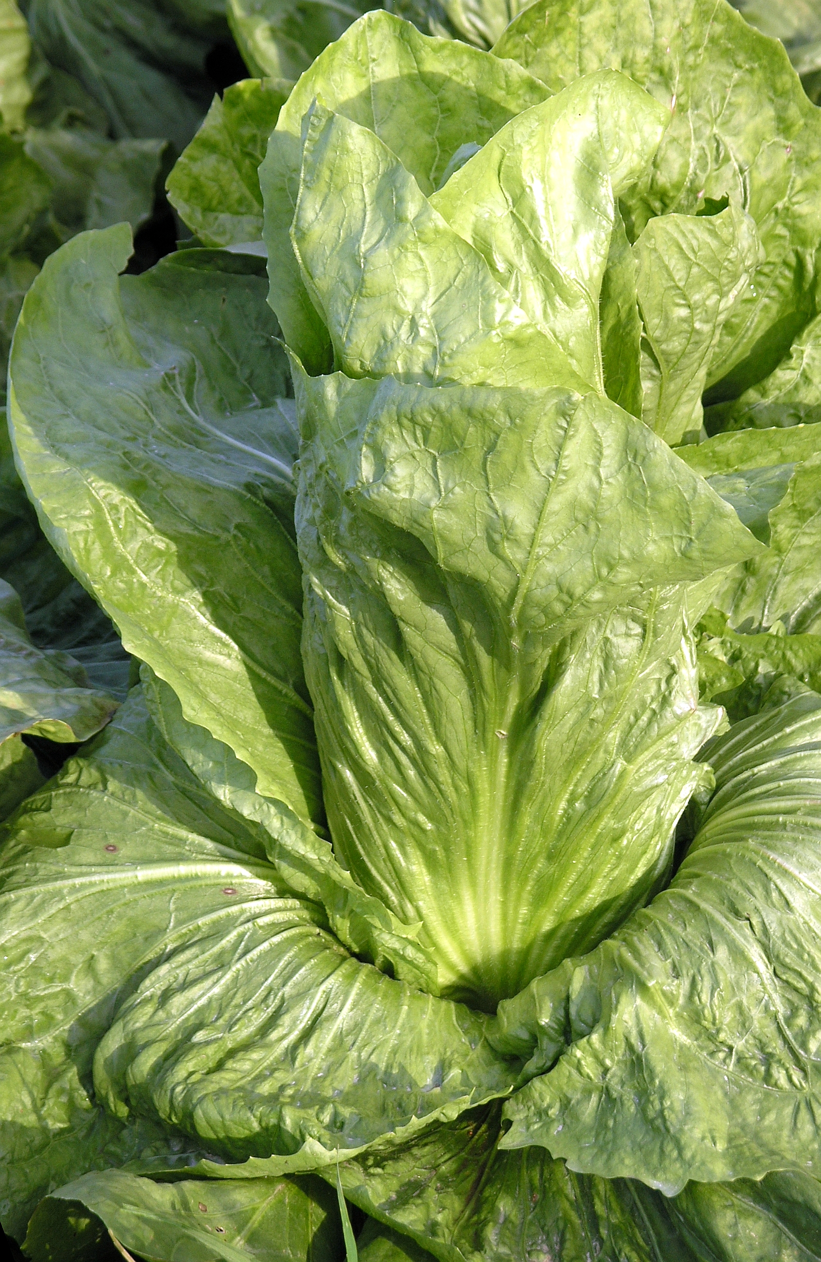 Zuckerhut Pflanze Kopfbildung